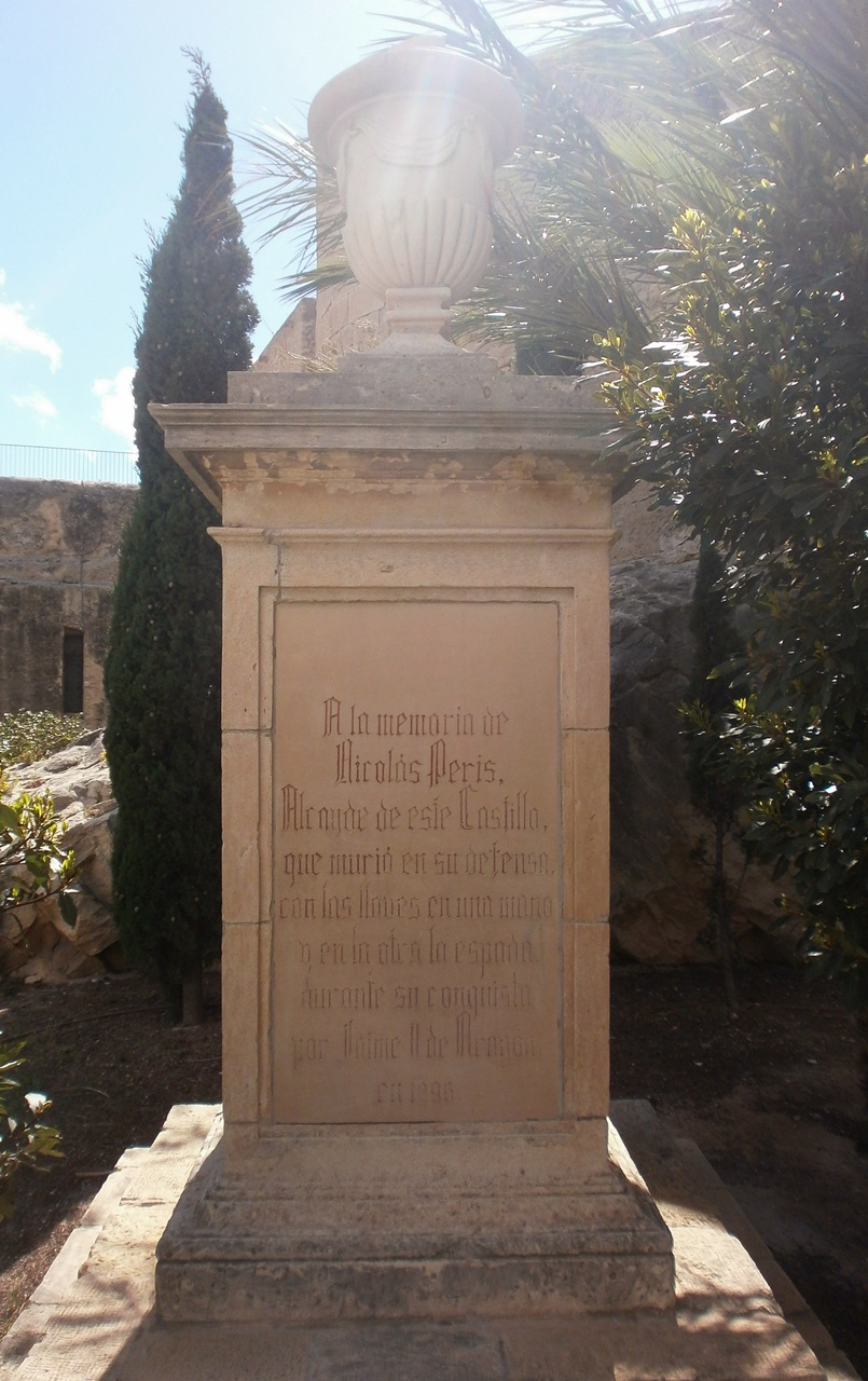 Monumento a Nicolás Peris en el Castillo de Santa Bárbara, Alicante, España.